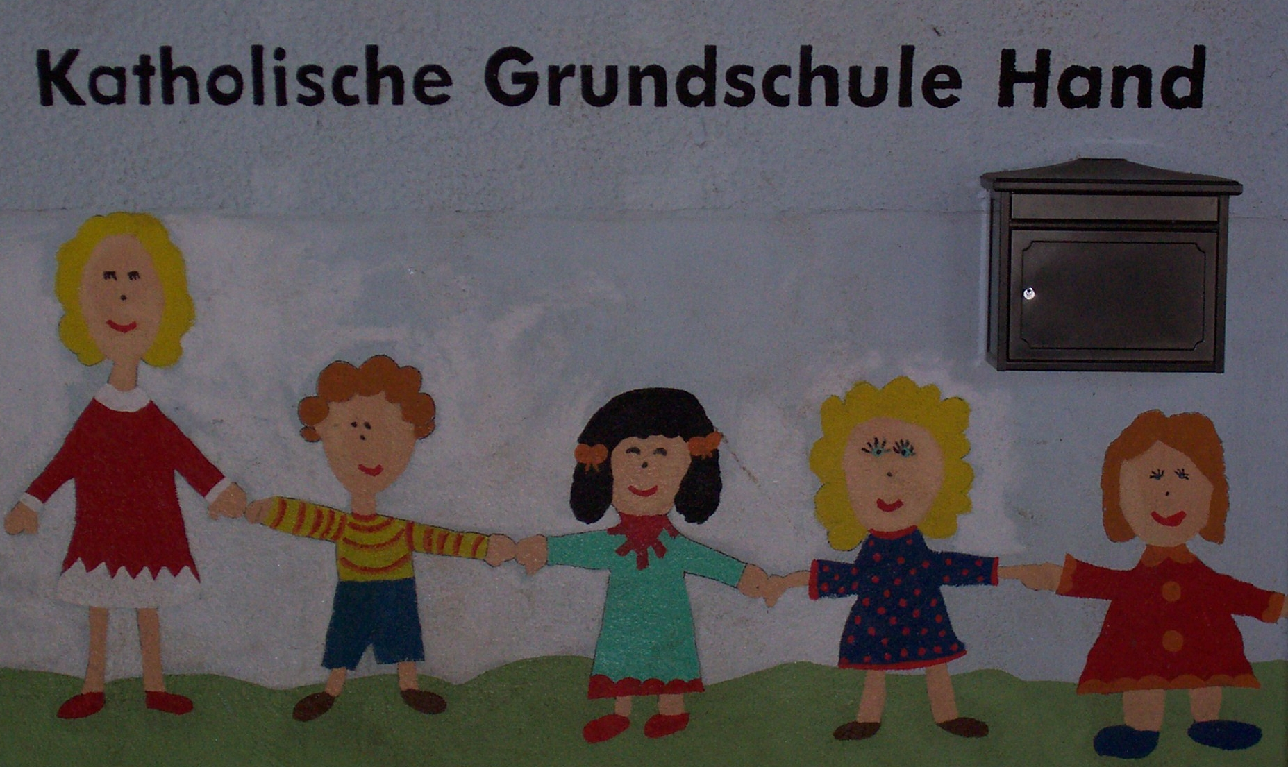 Wandbemalung mit dem Schulmotto 'Hand in Hand' vor dem Haupteingang der KGS Hand